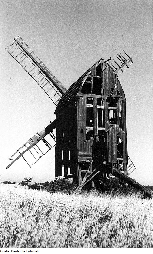 Original image description from the Deutsche Fotothek Eimersleben. Bockmühle, ruinös, Baujahr 1848